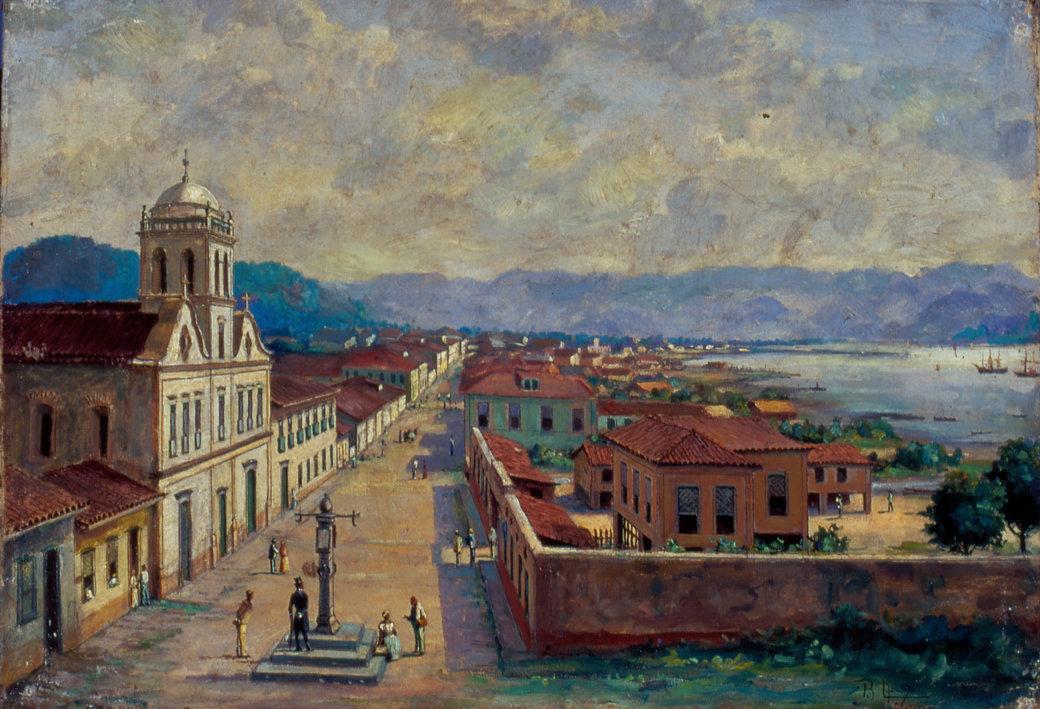 Obra que integra o acervo do Museu Paulista da USP. Coleção Benedito Calixto de Jesus - CBCJ